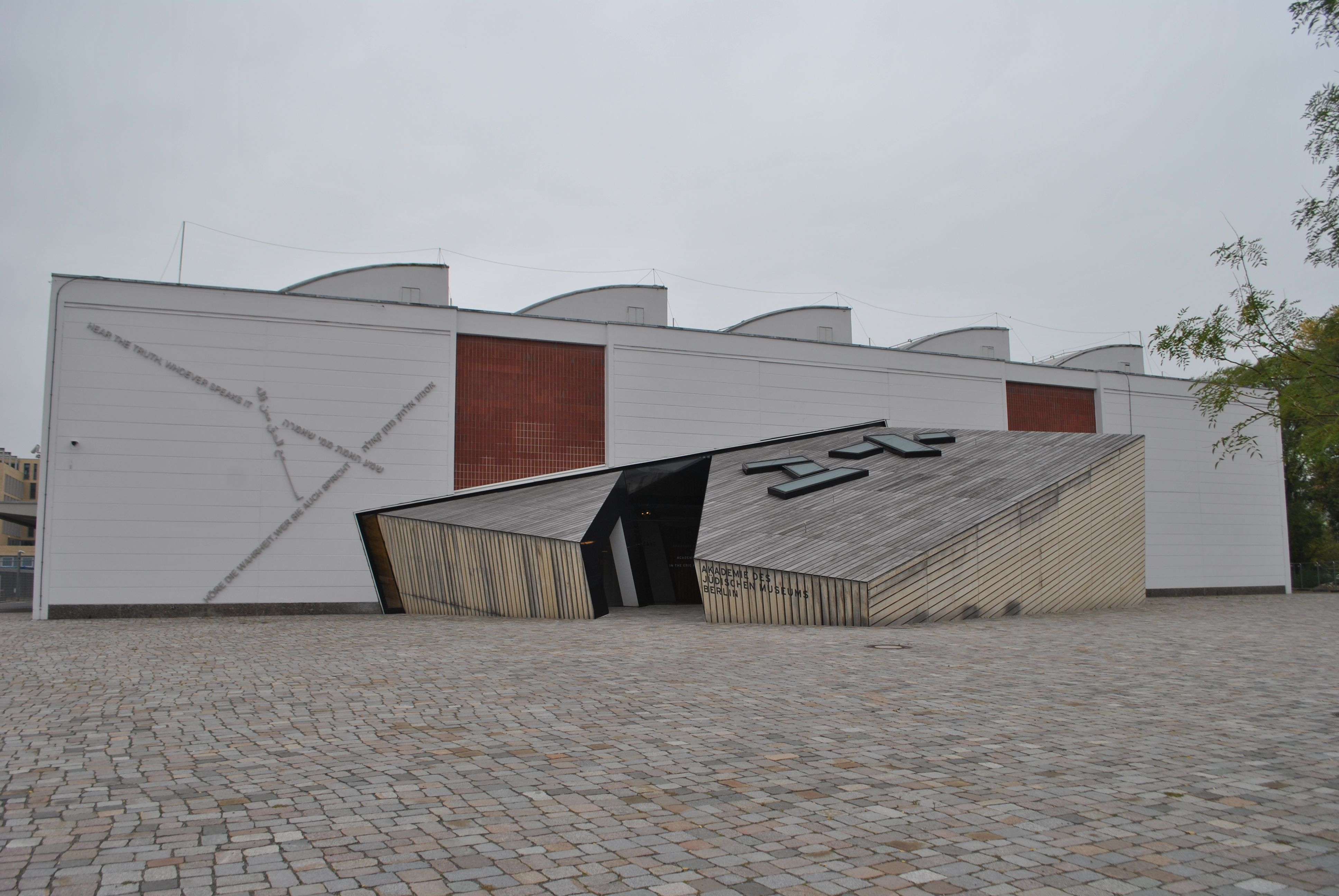 Die Akademie des Jüdischen Museums Berlin Außenansicht